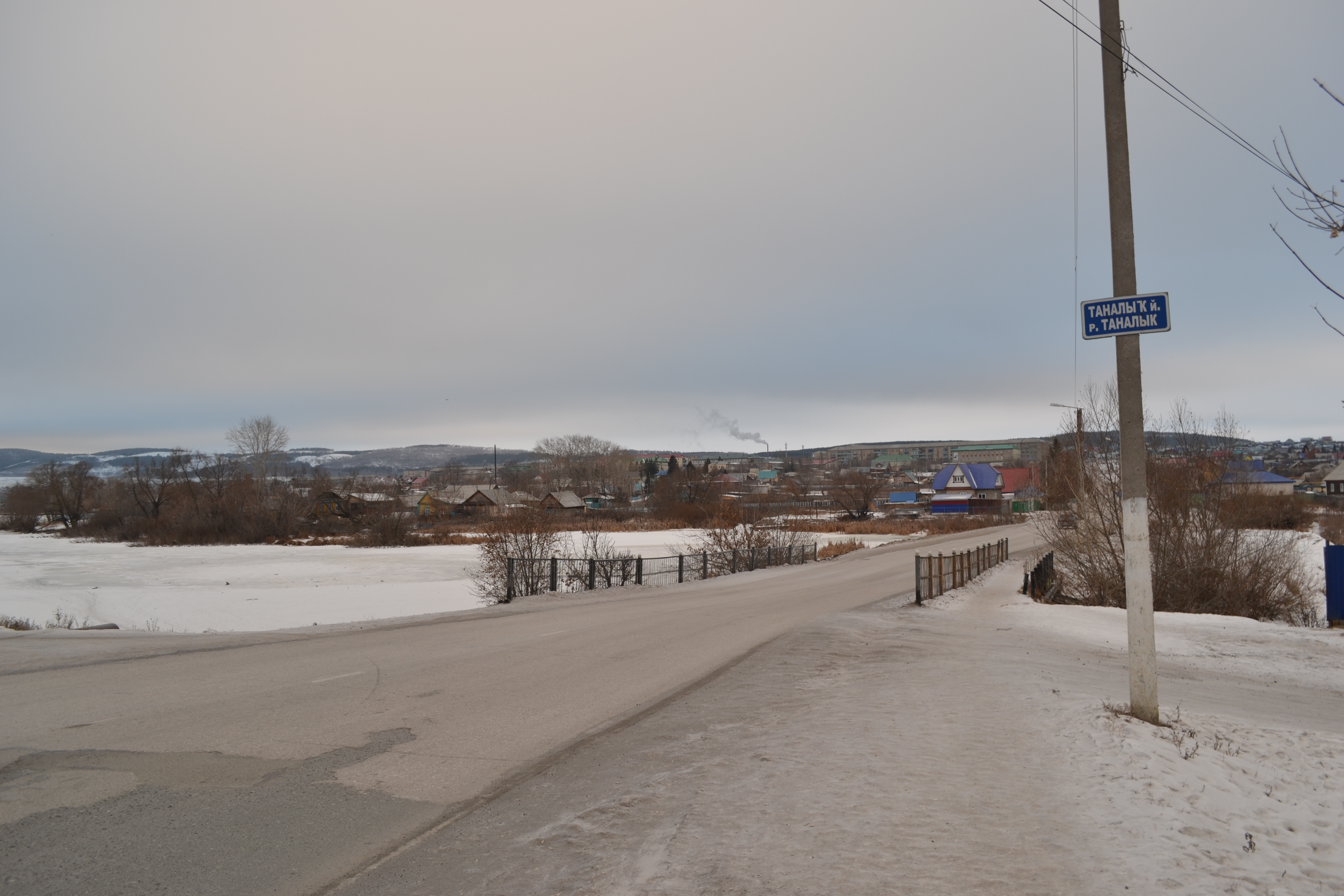 Мост через реку Таналык в Баймаке